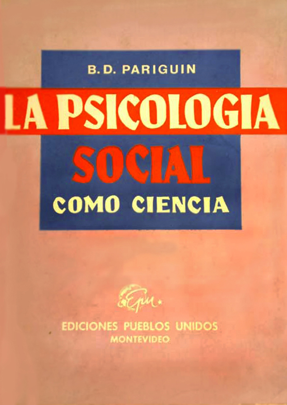 Обложка книги Б. Д. Парыгин "Социальная психология как наука". 1967. На испанском языке.